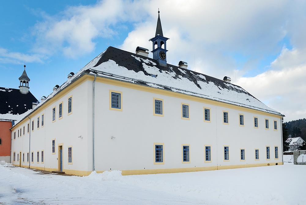 Rekonstruovaný františkánský klášter v Hostinném